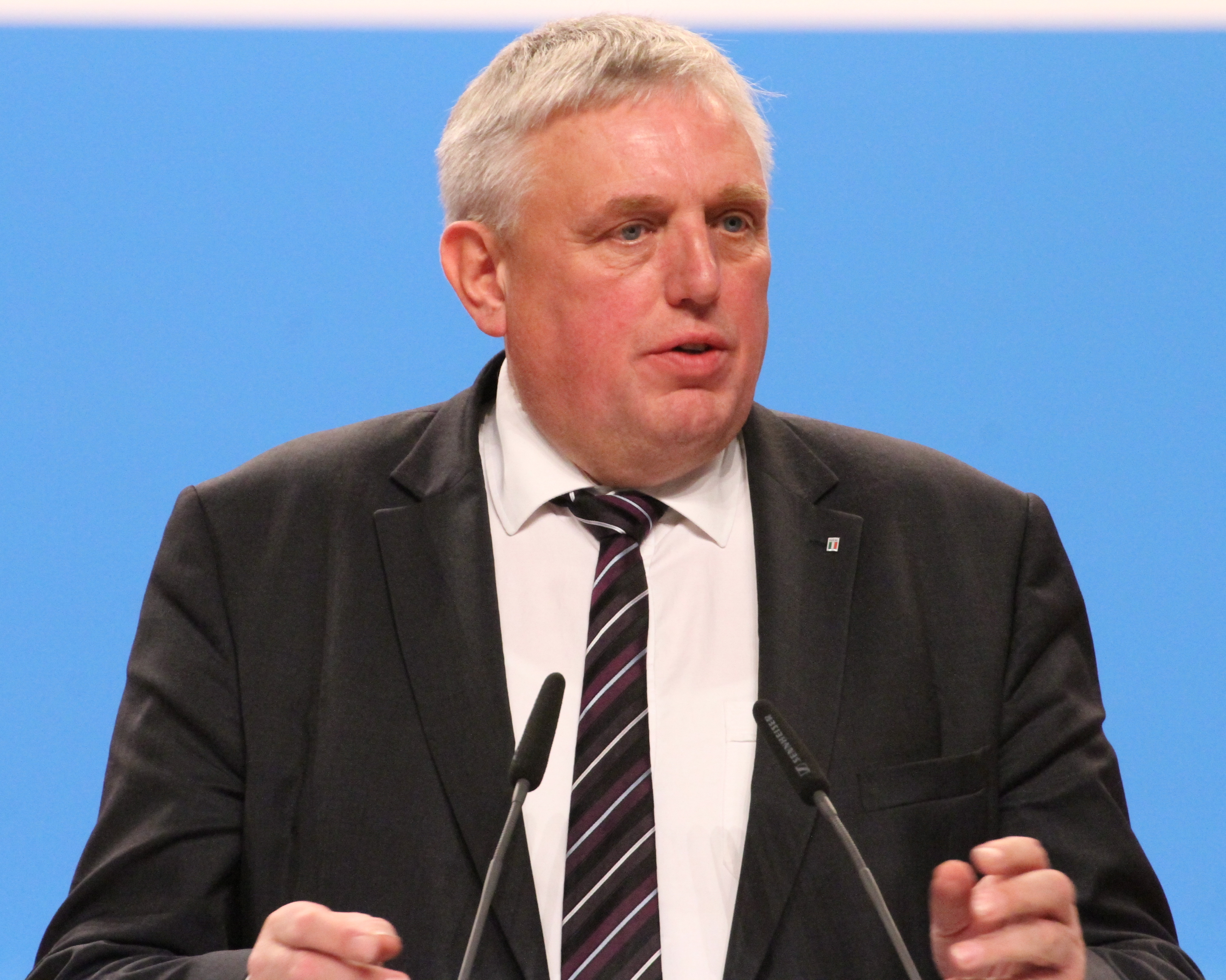 Karl-Josef Laumann auf dem CDU Bundesparteitag Dezember 2014 in Köln